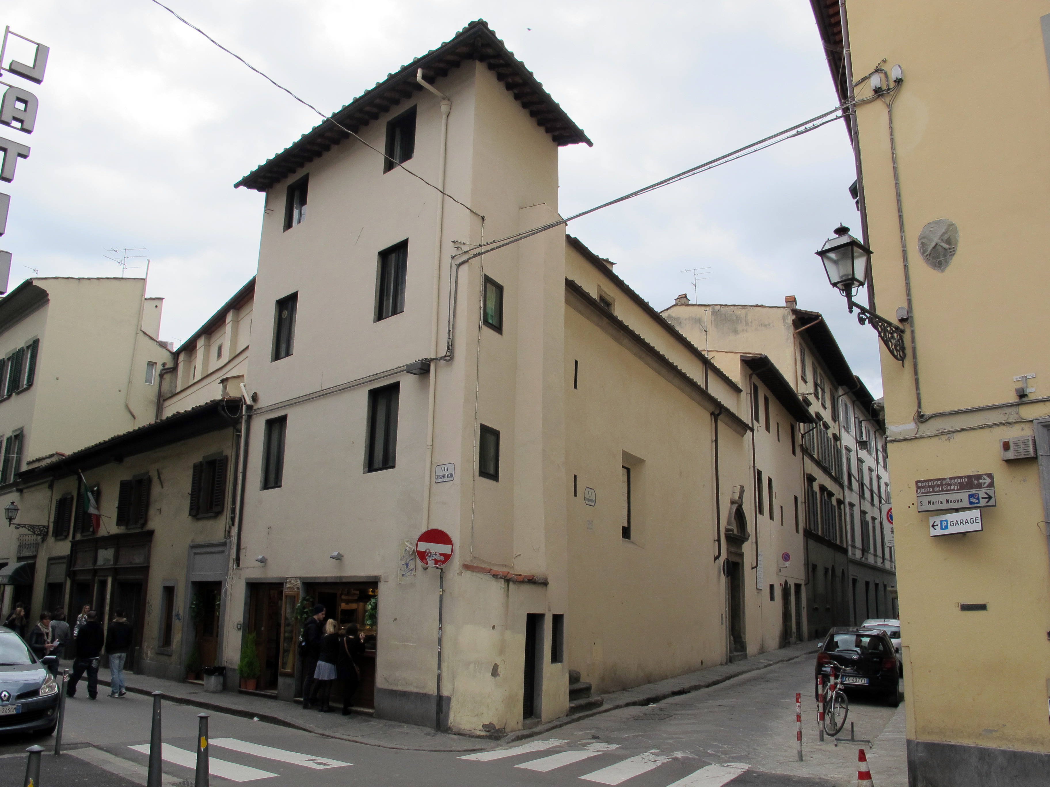 Via verdi angolo via pandolfini